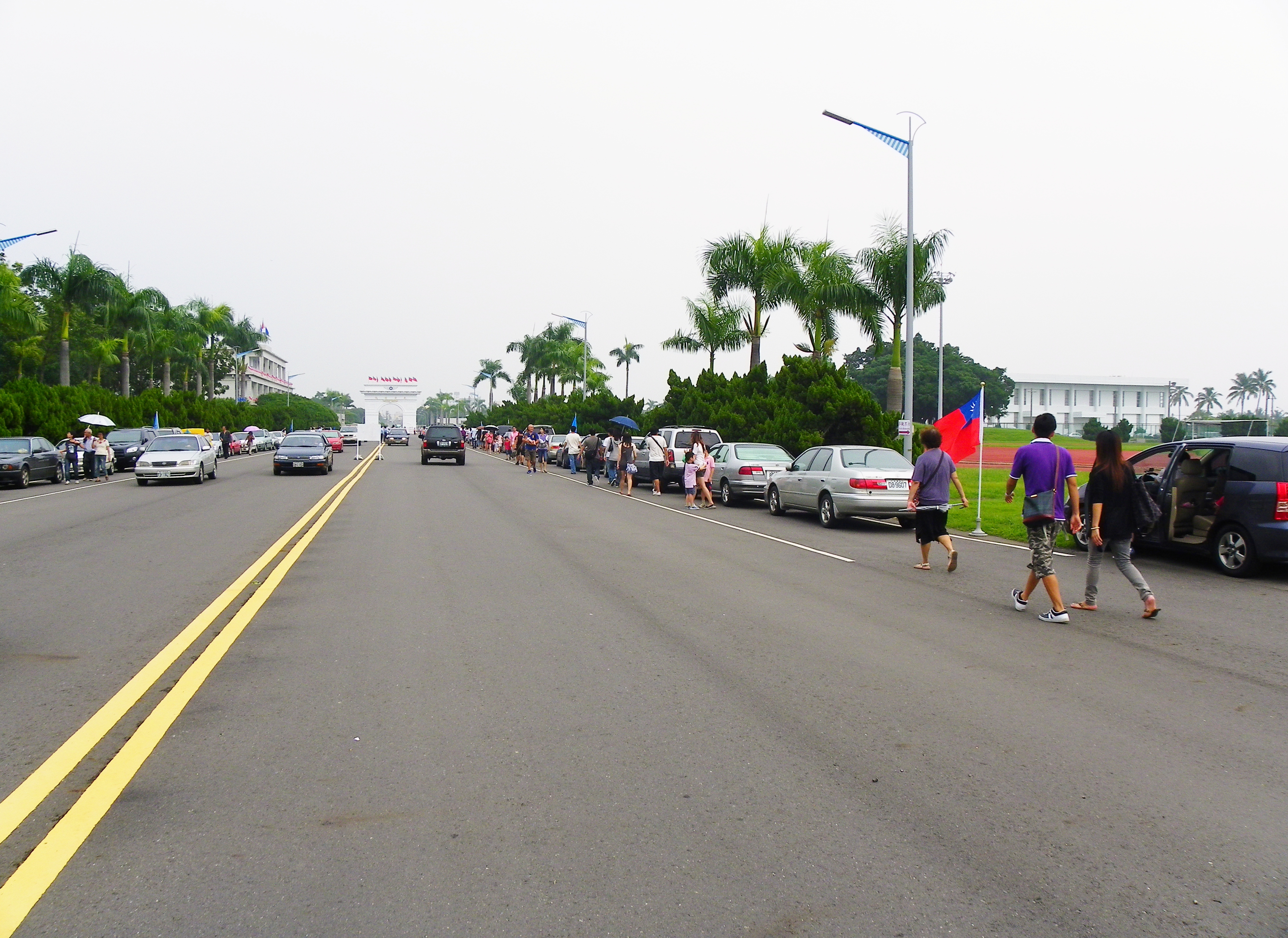 從空軍岡山基地忠勇路東向遠望空軍官校正門。